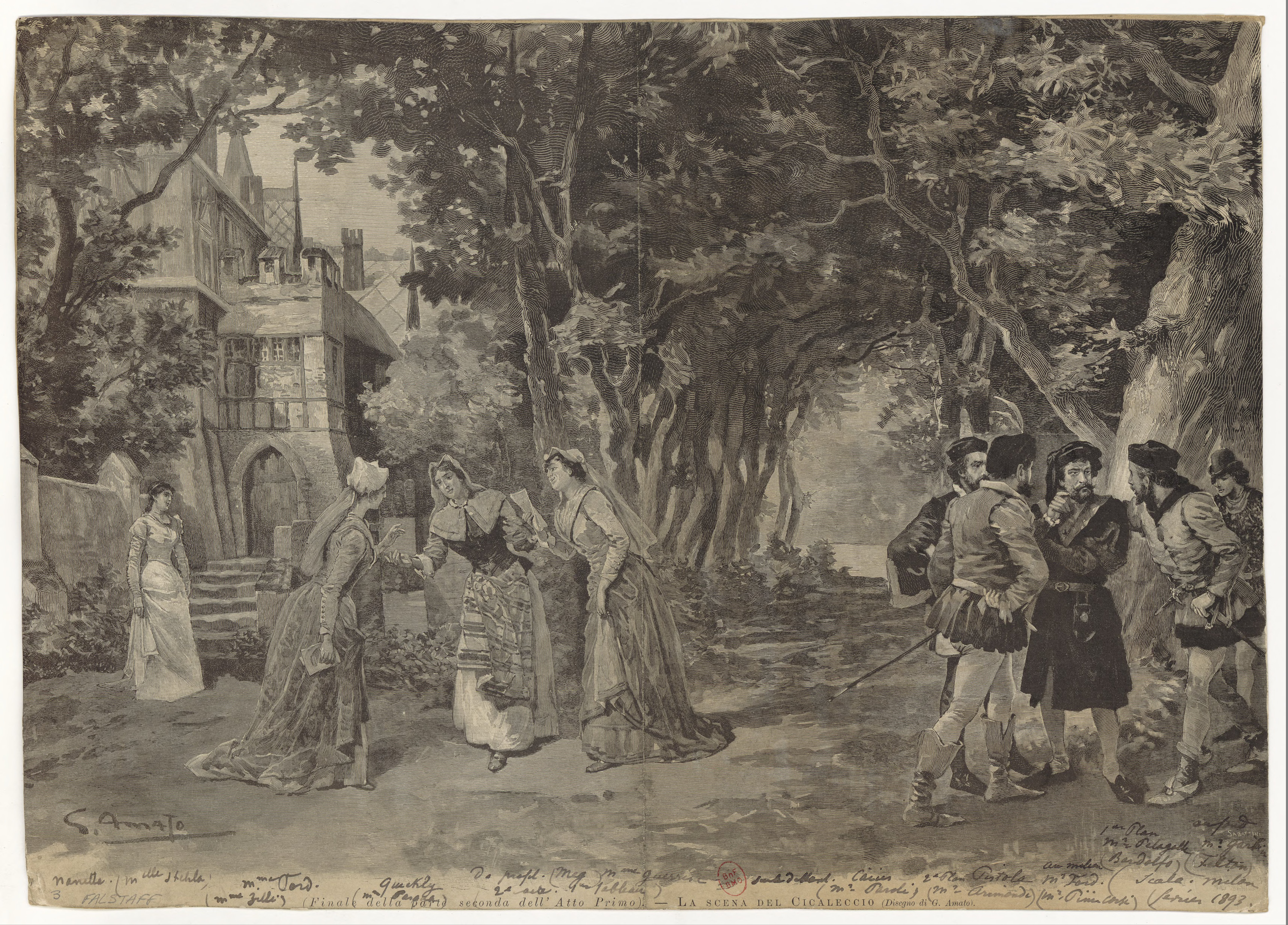 La scena del cicaleccio, finale della parte seconda dell'atto primo [dell'opera Falstaff] / disegno di G. Amato [sig.]